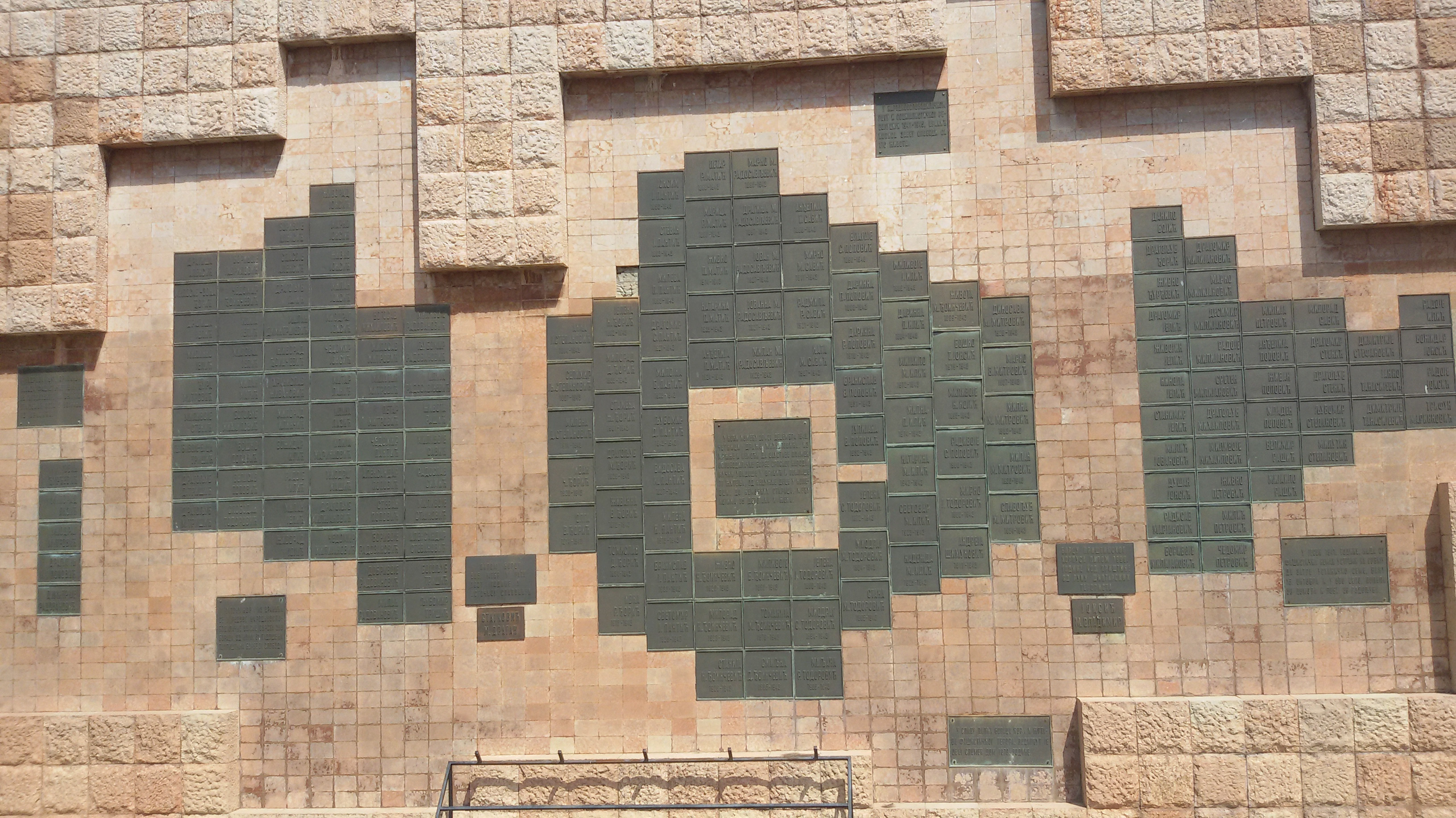 Имена палих бораца на спомен плочи на предњем зиду Спомен дома у Вранићу